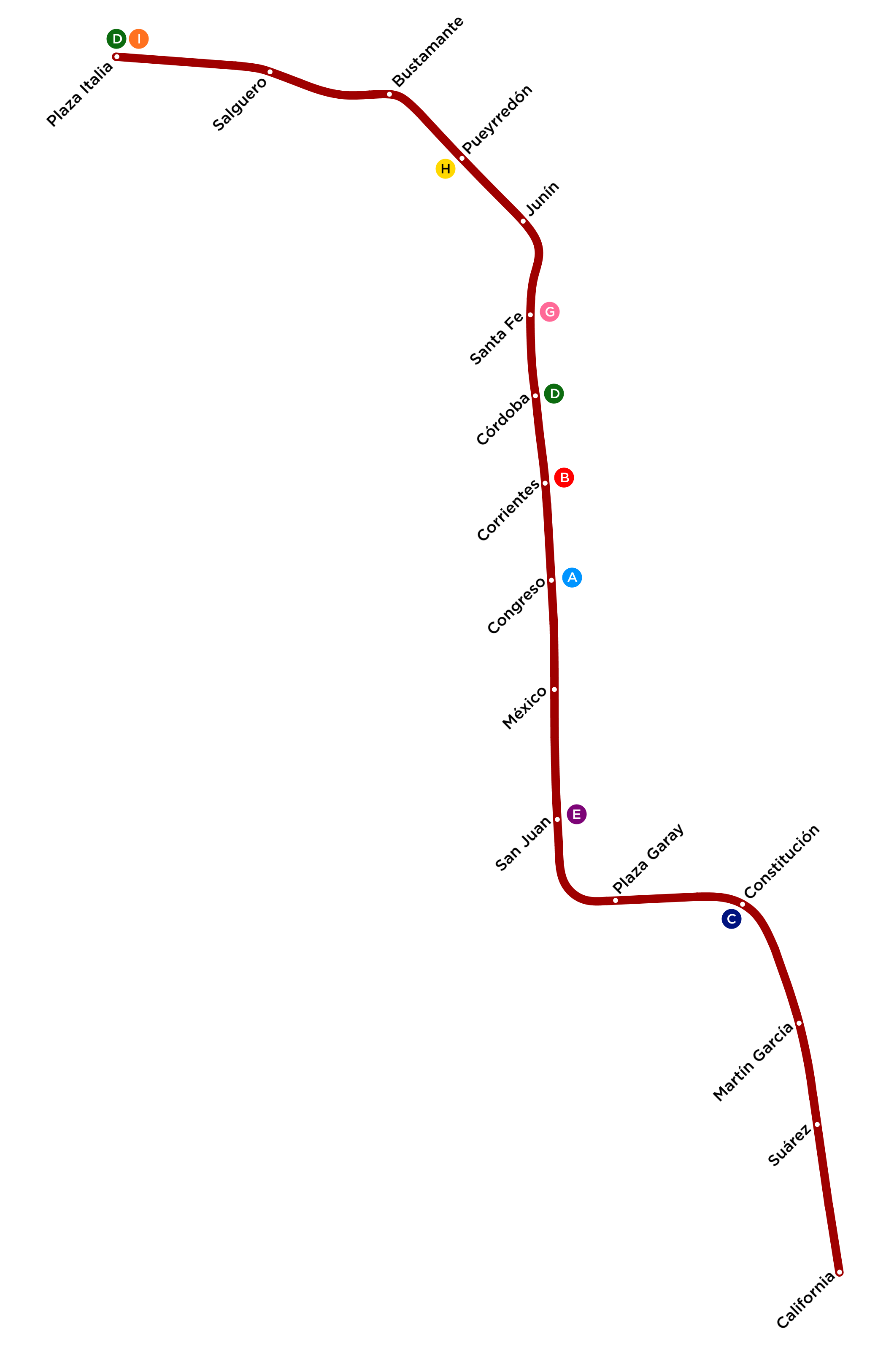 Recorrido de la línea F.